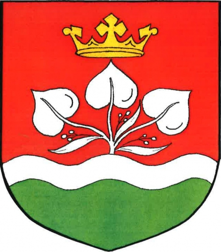 znak, Lupenice, okres Rychnov nad Kněžnou